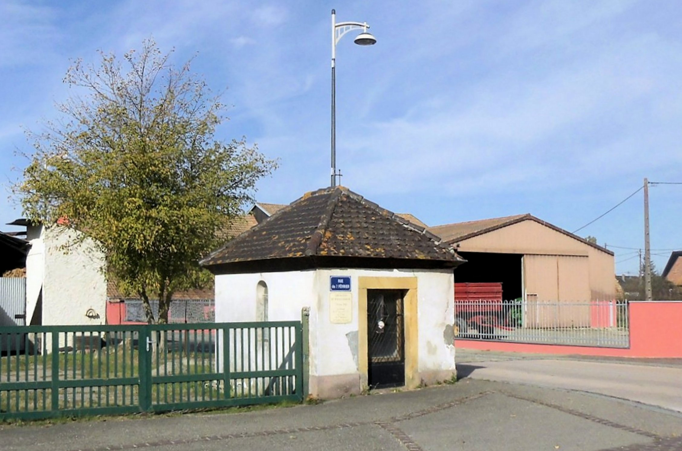 La chapelle de la paix à Roggenhouse